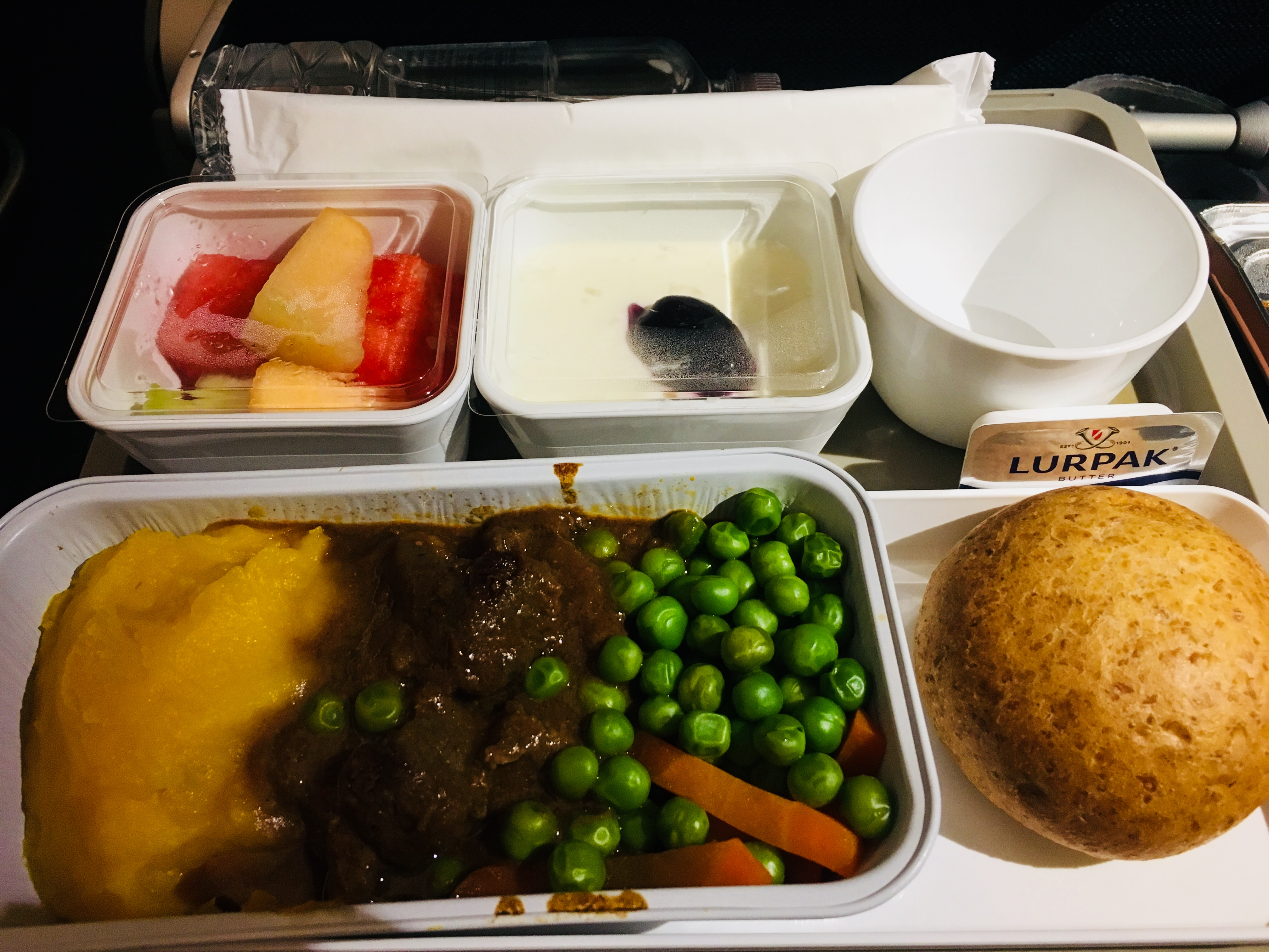 国泰航空经济客舱飞机餐（2018年），除主菜之外配有水果、甜点、樽装水、面包及饮料服务。